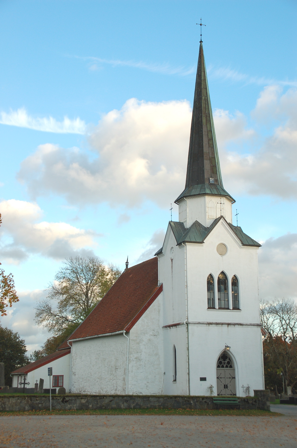 Rakkestad kirke, Rakkestad, Østfold, Norway